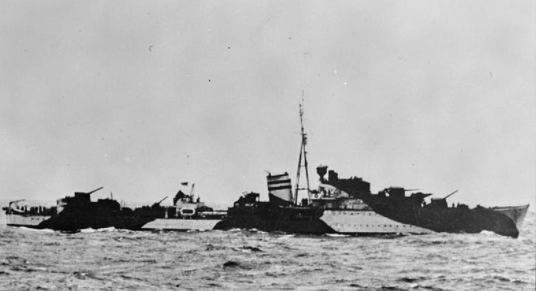 British destroyer HMS KIMBERLEY underway.